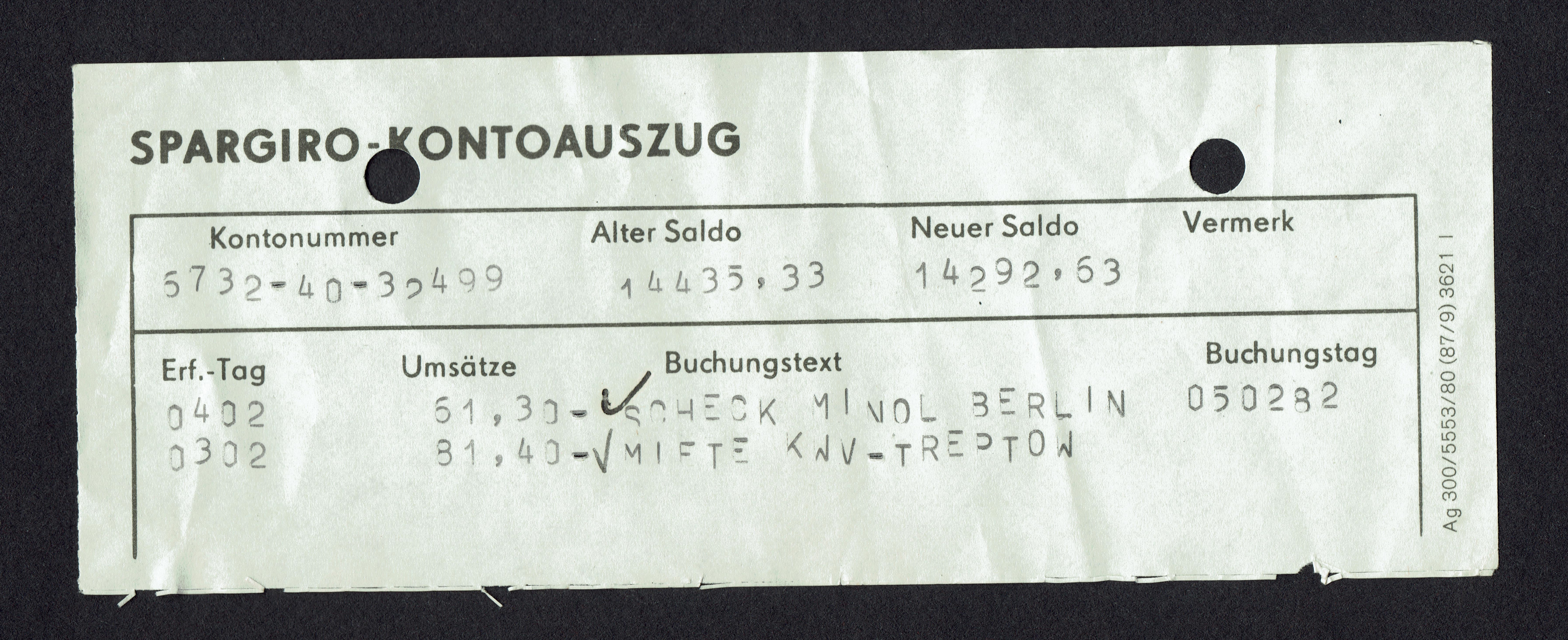 Kontoauszug der Staatsbank der DDR vom 5.Februar 1982